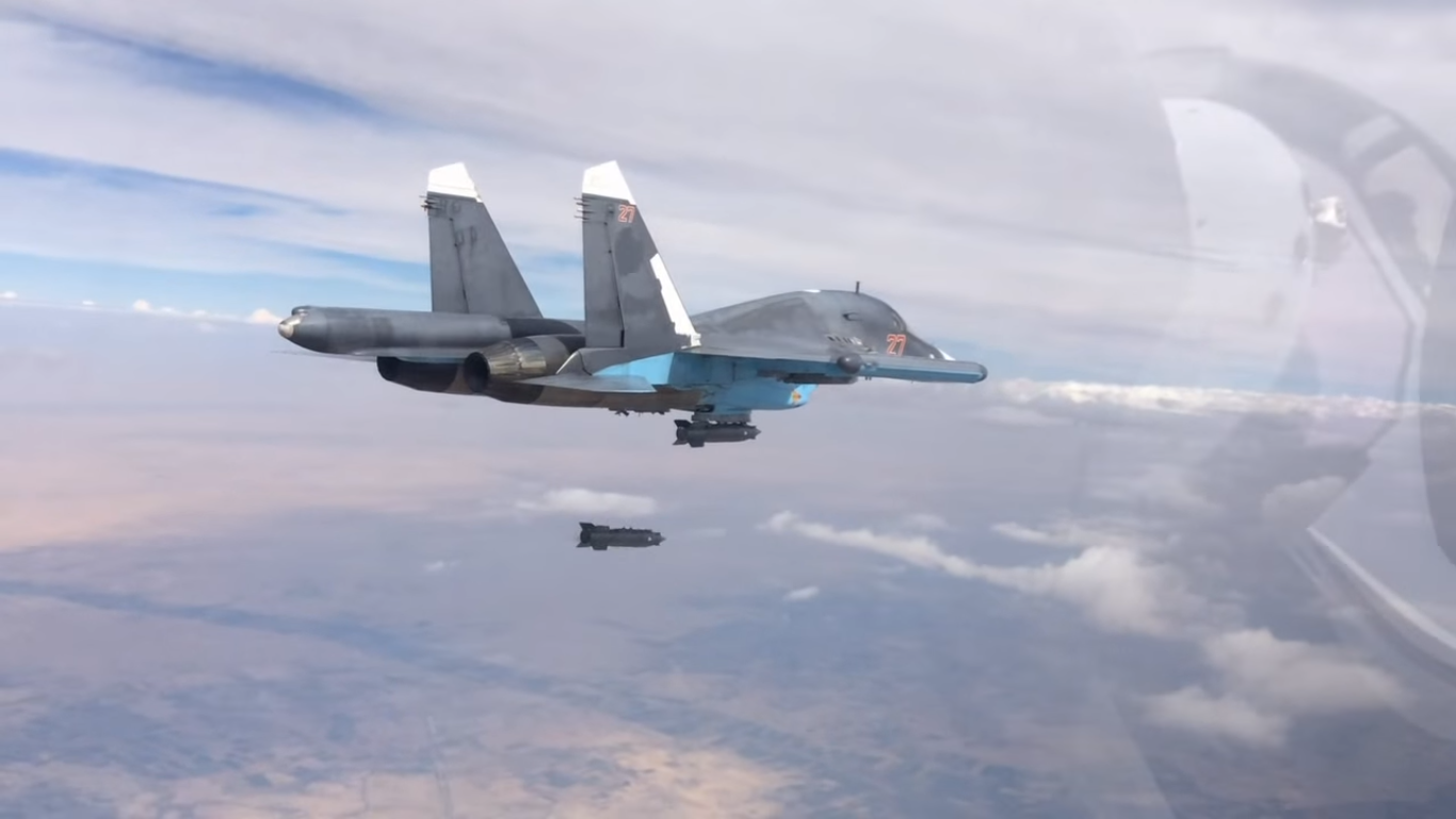 Un Soukhoï Su-34 frappant une position ennemie en Syrie (région Alep ou Racca) avec une KAB-500S, une bombe de 560 kg guidée par satellite.